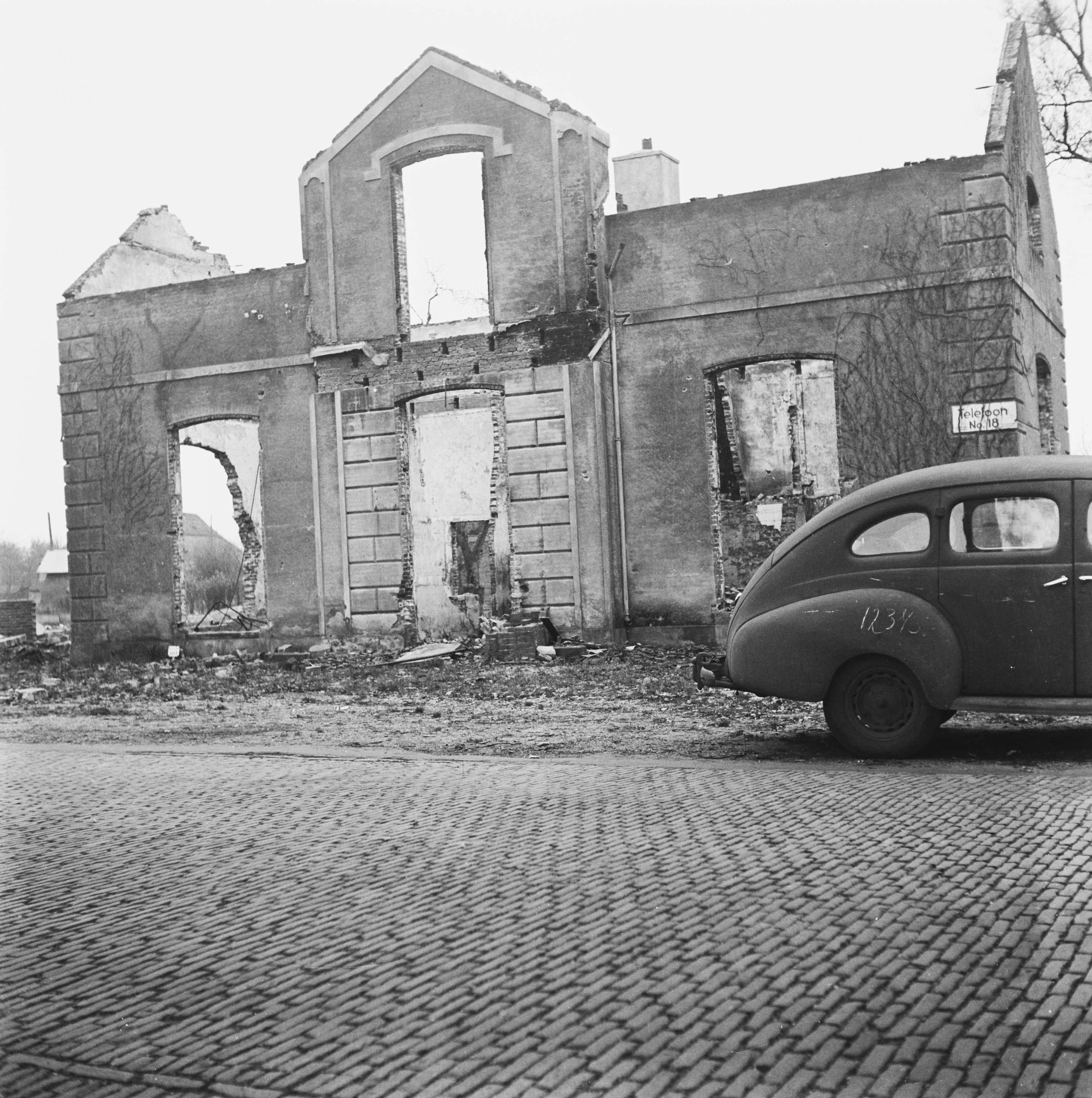 Collectie / Archief : Fotocollectie Anefo Reportage / Serie : Reportage Putten Beschrijving : Een van de 105 huizen die door de Duitsers in brand zijn gestoken als represaillemaatregel voor een aanslag op een Duitse militair Datum : 2 november 1945 Locatie : Gelderland, Putten Trefwoorden : gebouwen, huizen, tweede wereldoorlog, verwoestingen Fotograaf : Haren Noman, Theo van / Anefo Auteursrechthebbende : Nationaal Archief Materiaalsoort : Negatief (zwart/wit) Nummer archiefinventaris : bekijk toegang 2.24.01.03 Bestanddeelnummer : 901-0092